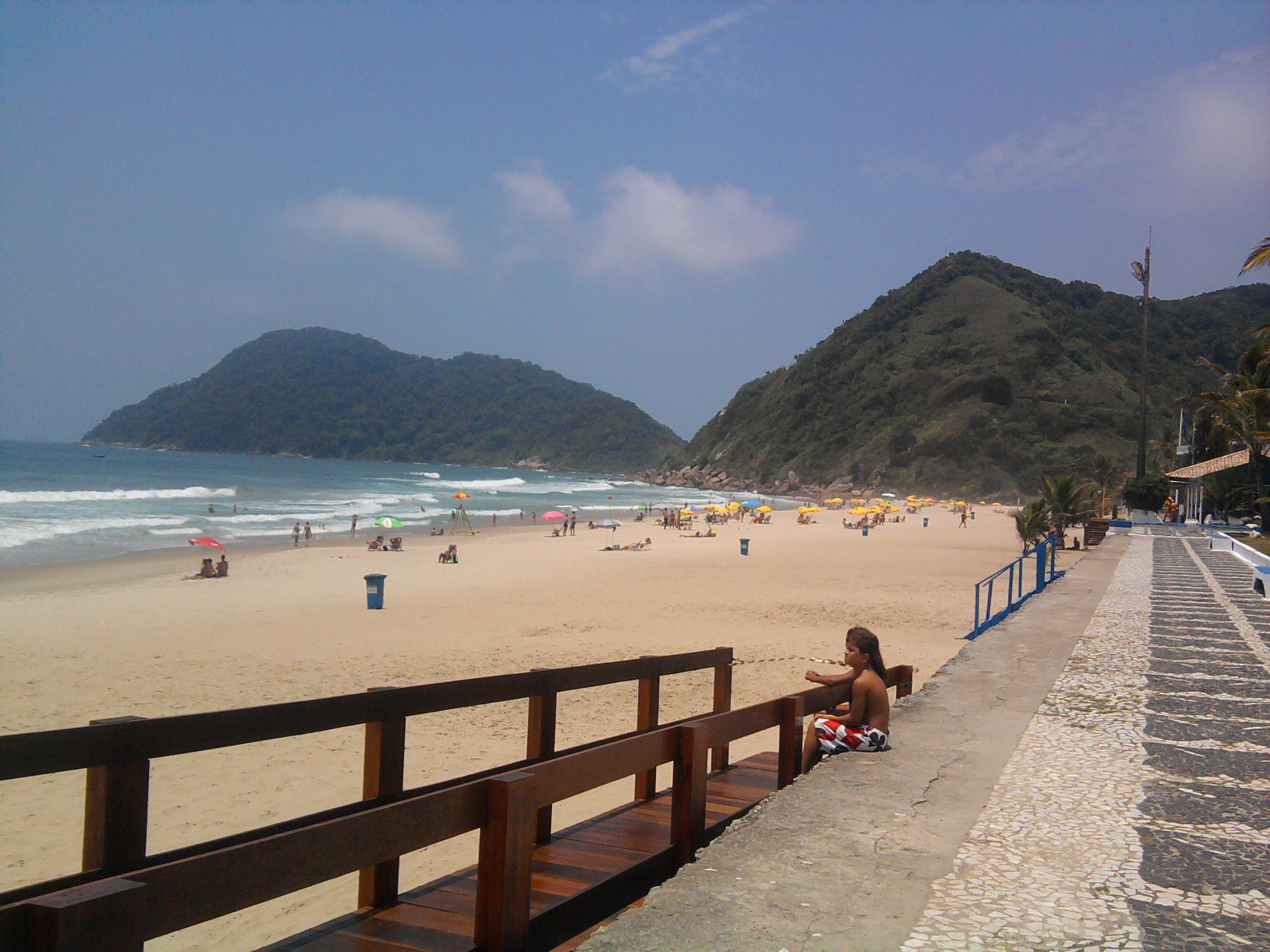 Praia do Tombo, Guarujá, São Paulo